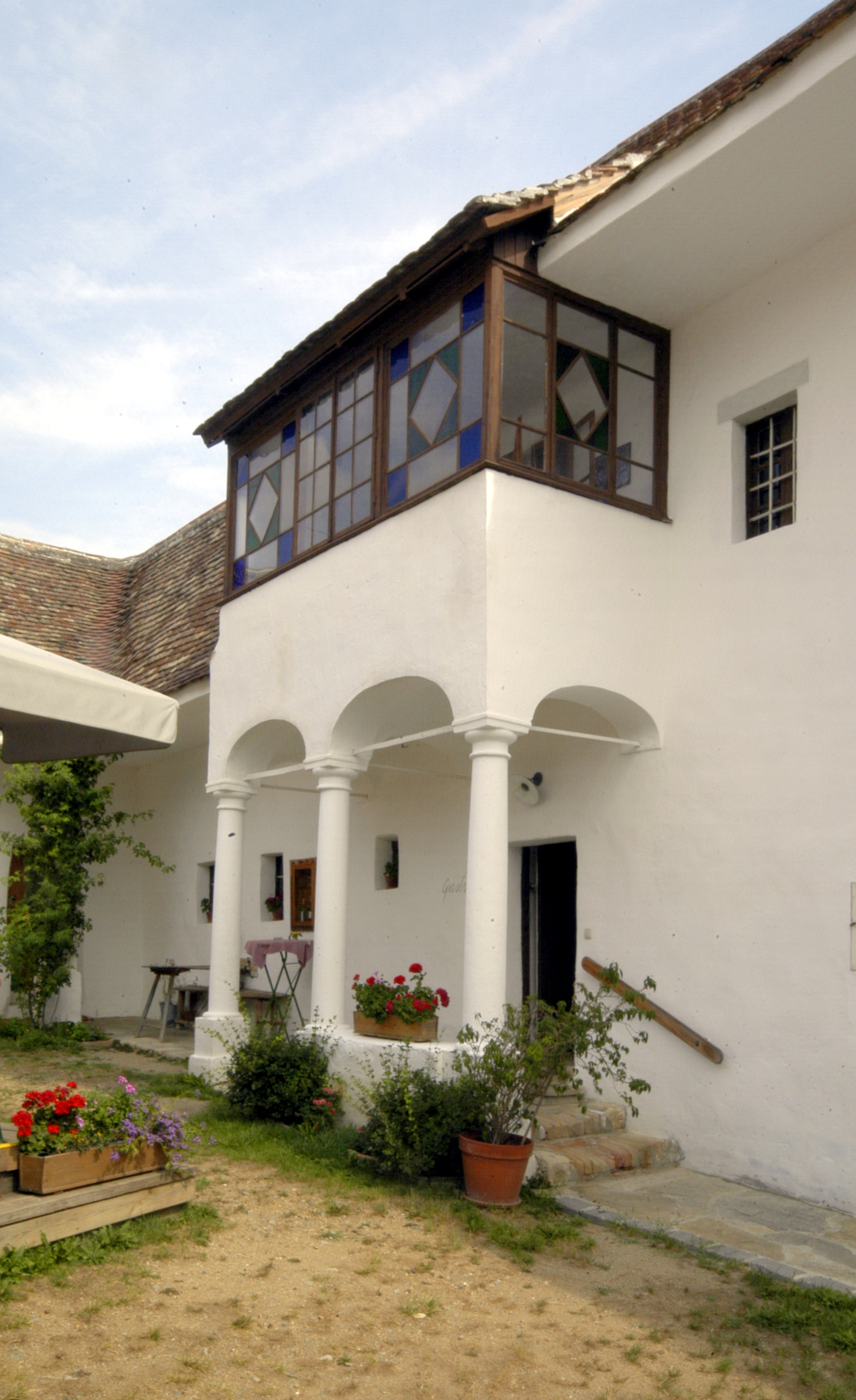 ehemaliger Meierhof in Radlbrunn säulengetragenen Balkon mit verglaster Holzveranda